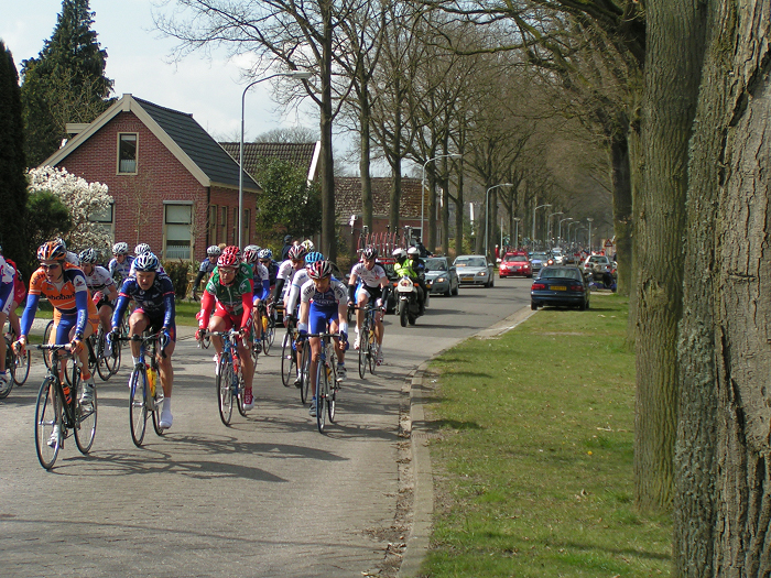 Ronde van Drenthe in 2008